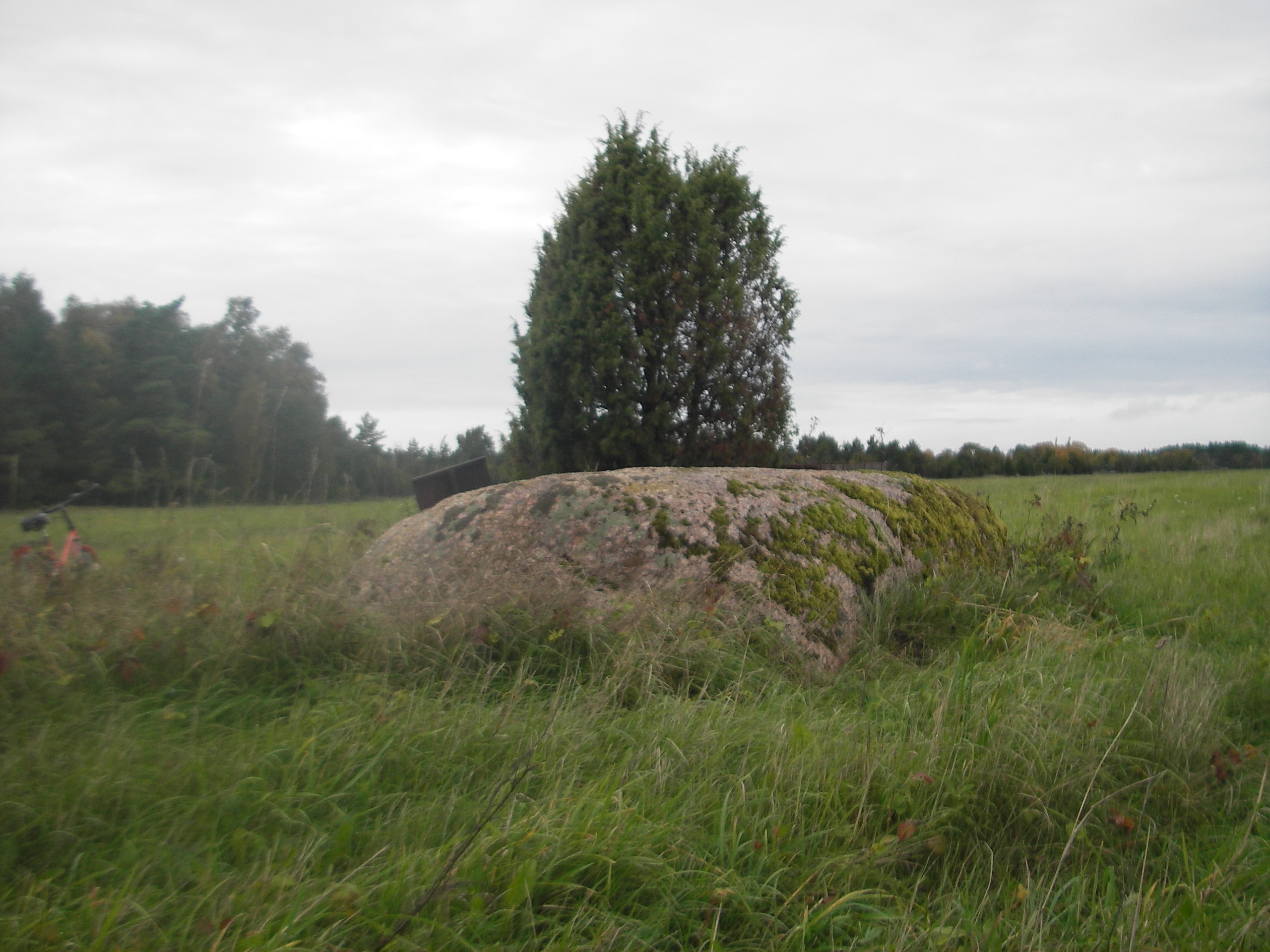 Pildistatud 2011,Aljava küla Kunnati